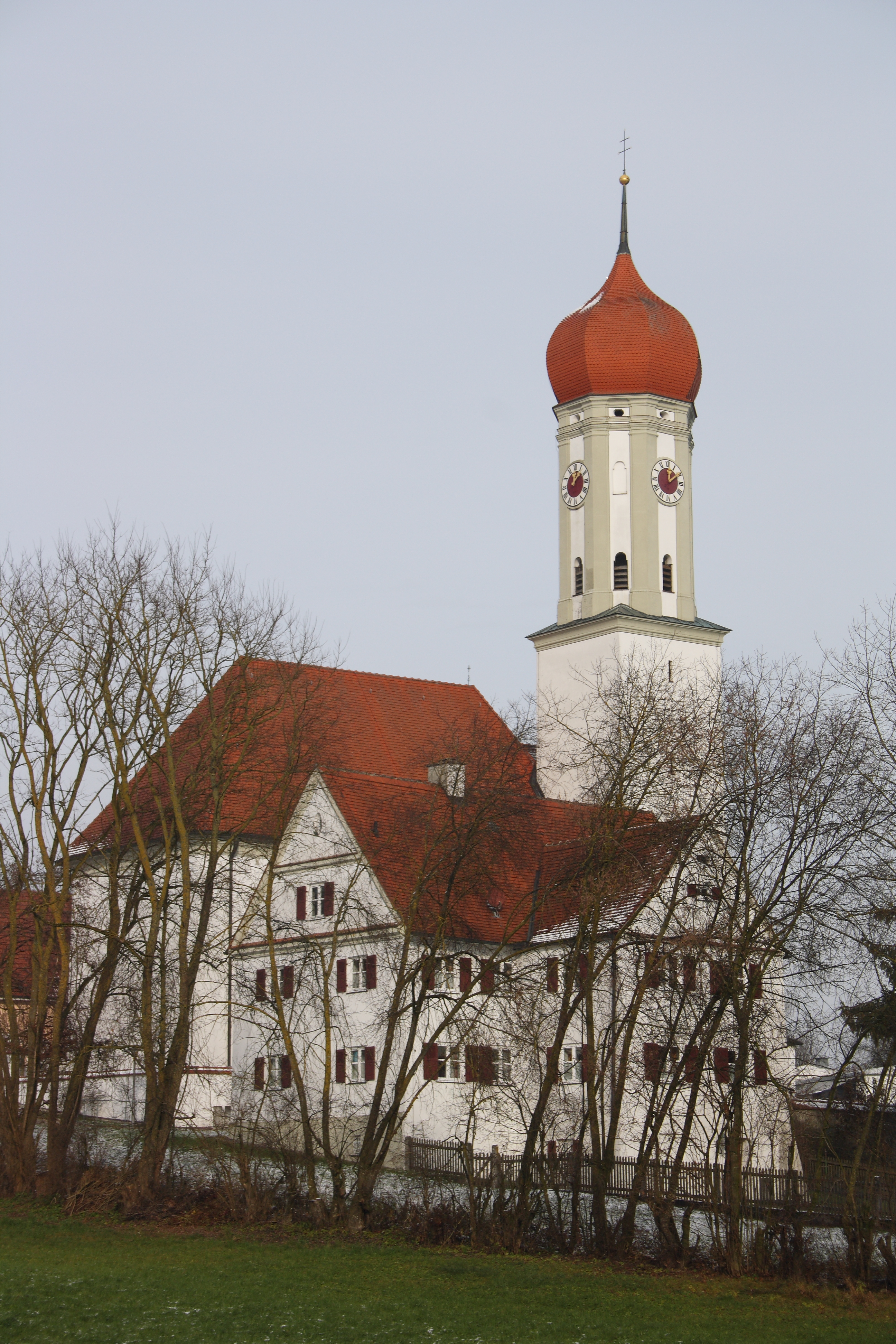 Katholische Pfarr- und Wallfahrtskirche Mariä Schmerzen in Waldkirch, einem Ortsteil von Winterbach (Schwaben), 1745 von Joseph Dossenberger (1721-1785) errichtet